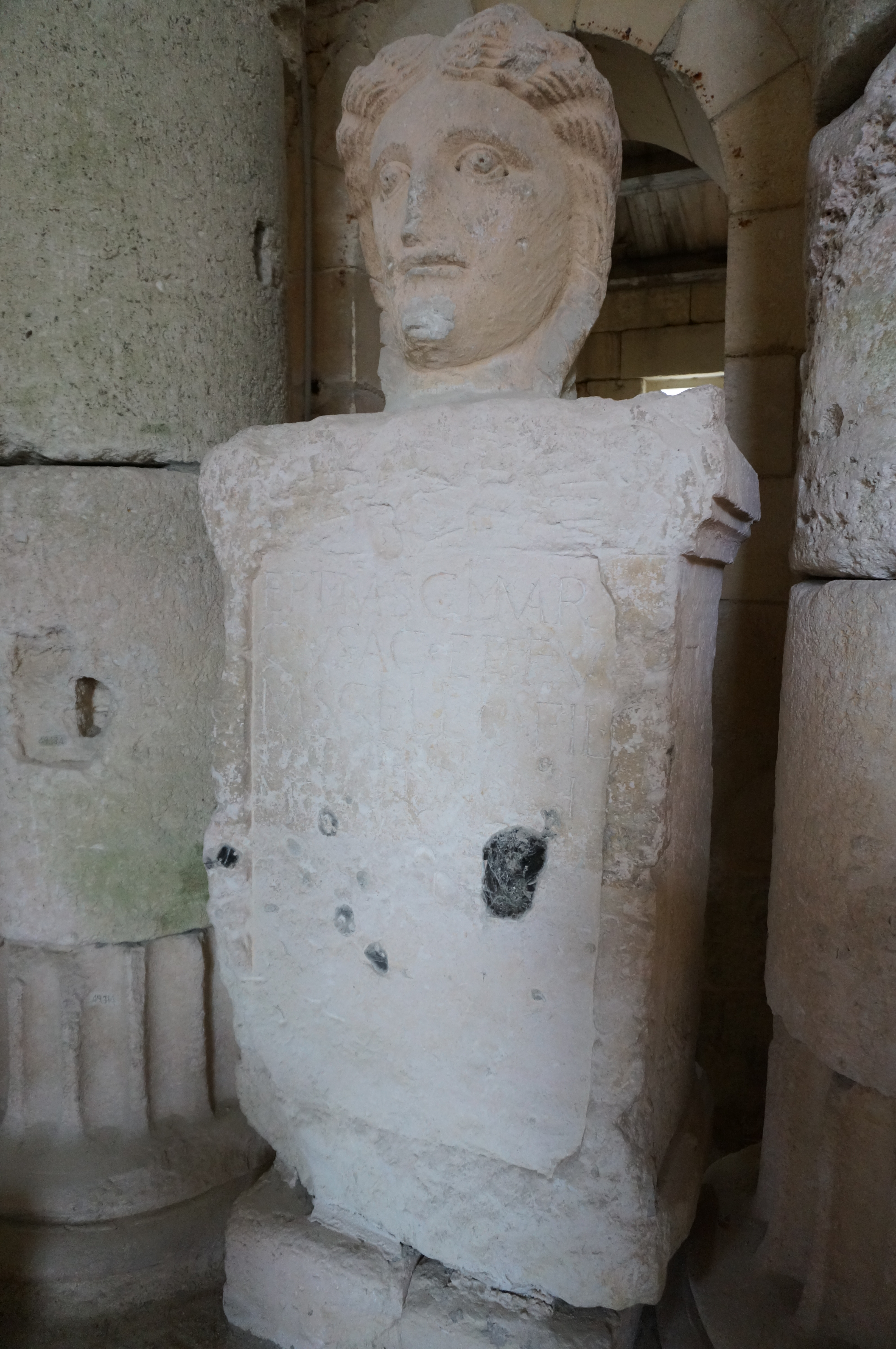 Tête colossale trouvée en 1896 à Aumagne, collection lapidaire de Saintes.